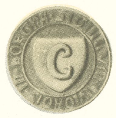 Porvoon kaupungin sinetti vuodelta 1498